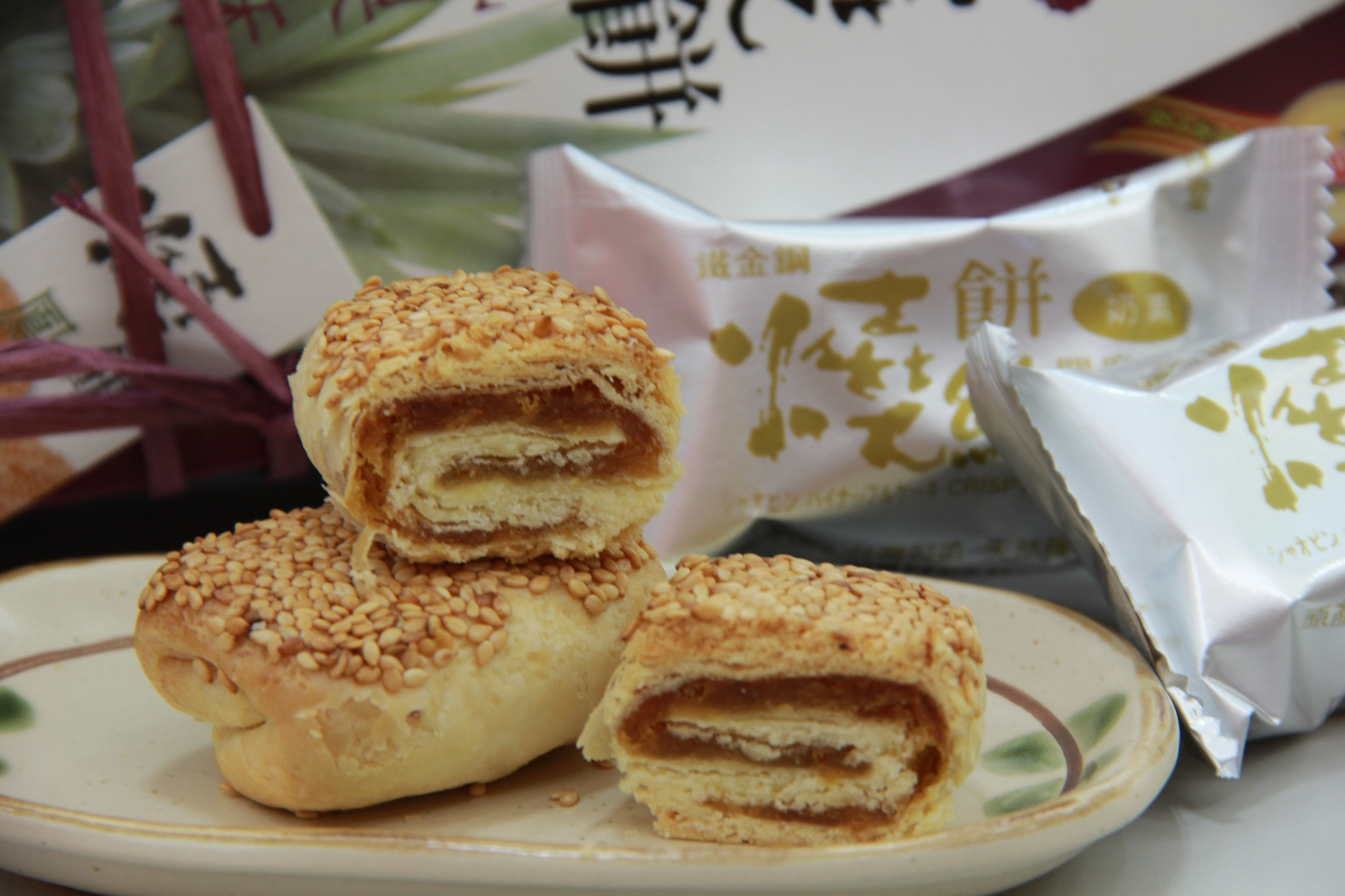 台南市關廟區中山路1段365號